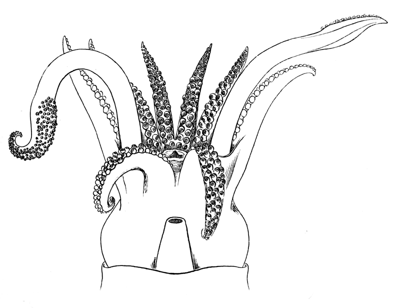 Rossia glaucopis